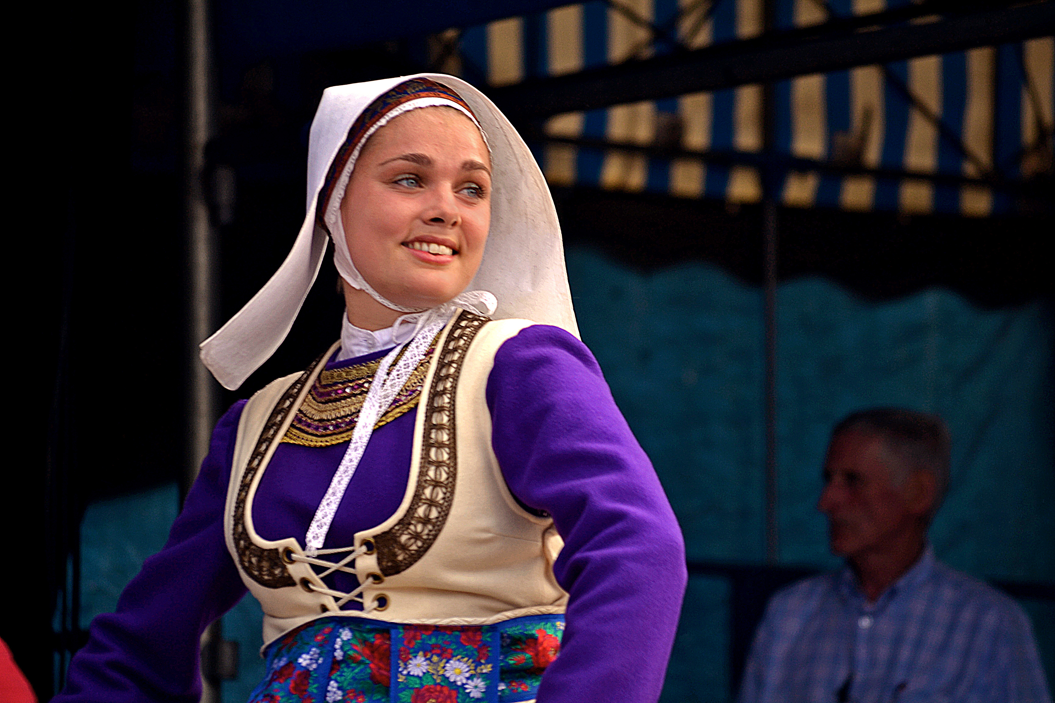 Bleuniadur au festival Gouel an Eost le 9 août 2015.